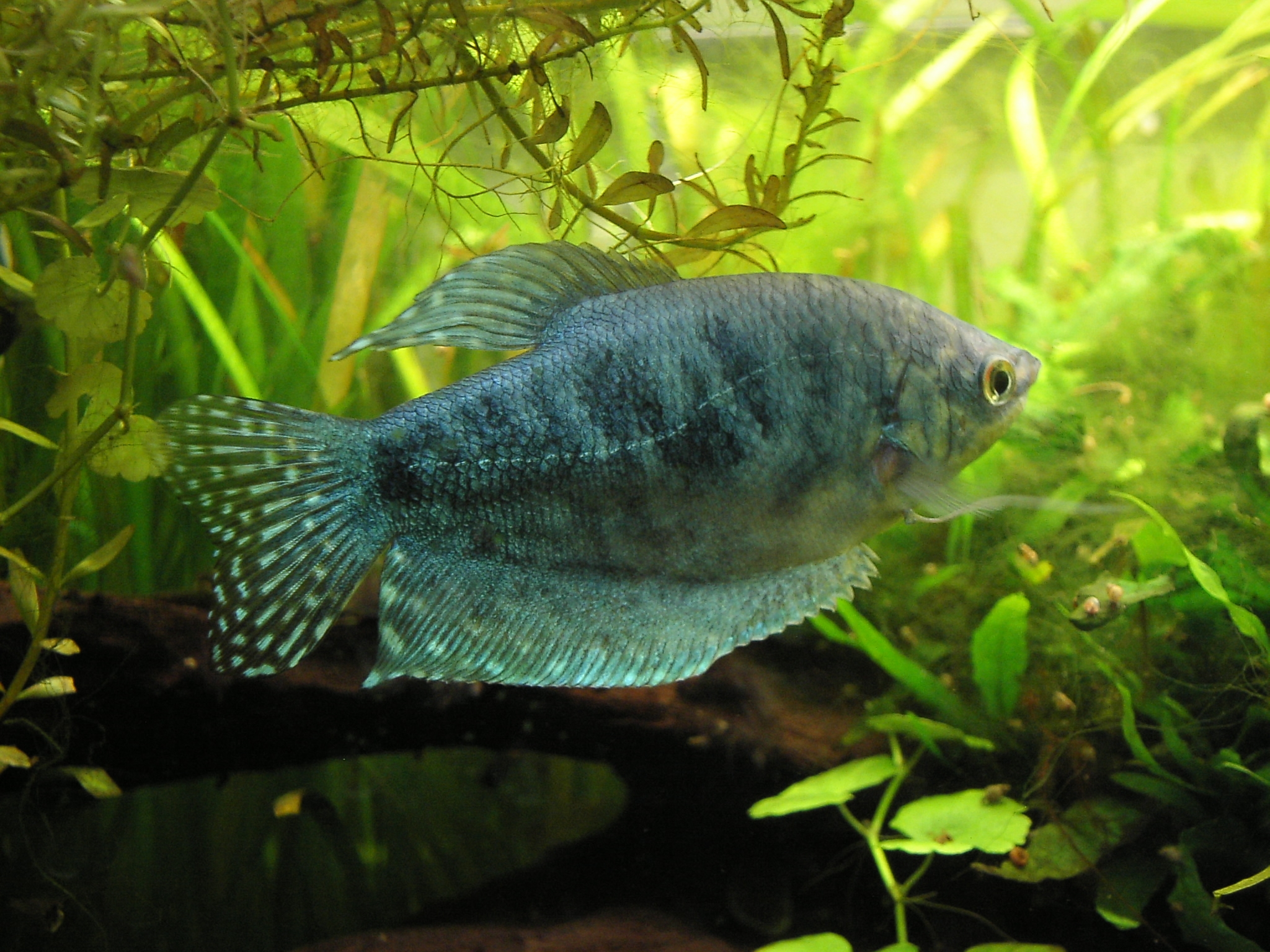 Punktierter Fadenfisch